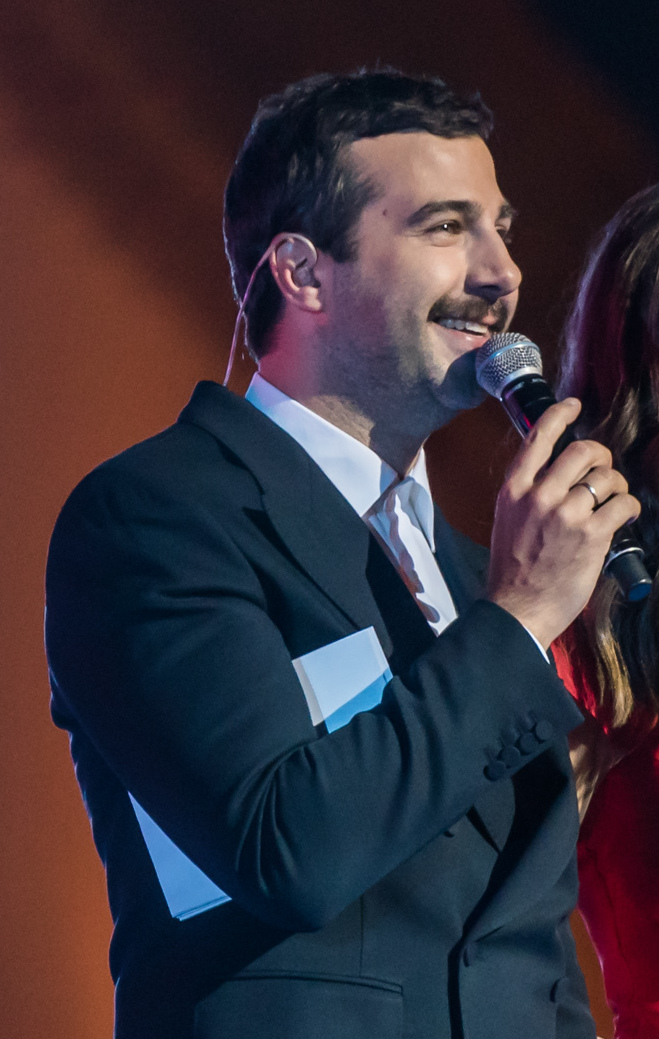 Иван Ургант и Дарья Александрова на Алых парусах 2018